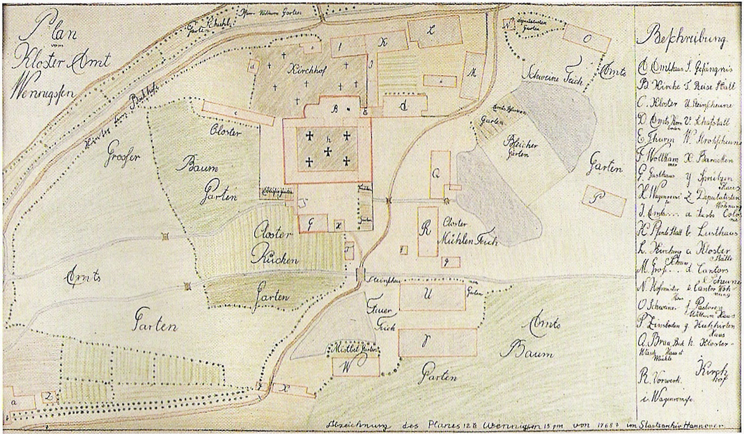 Klostergarten Wennigsen